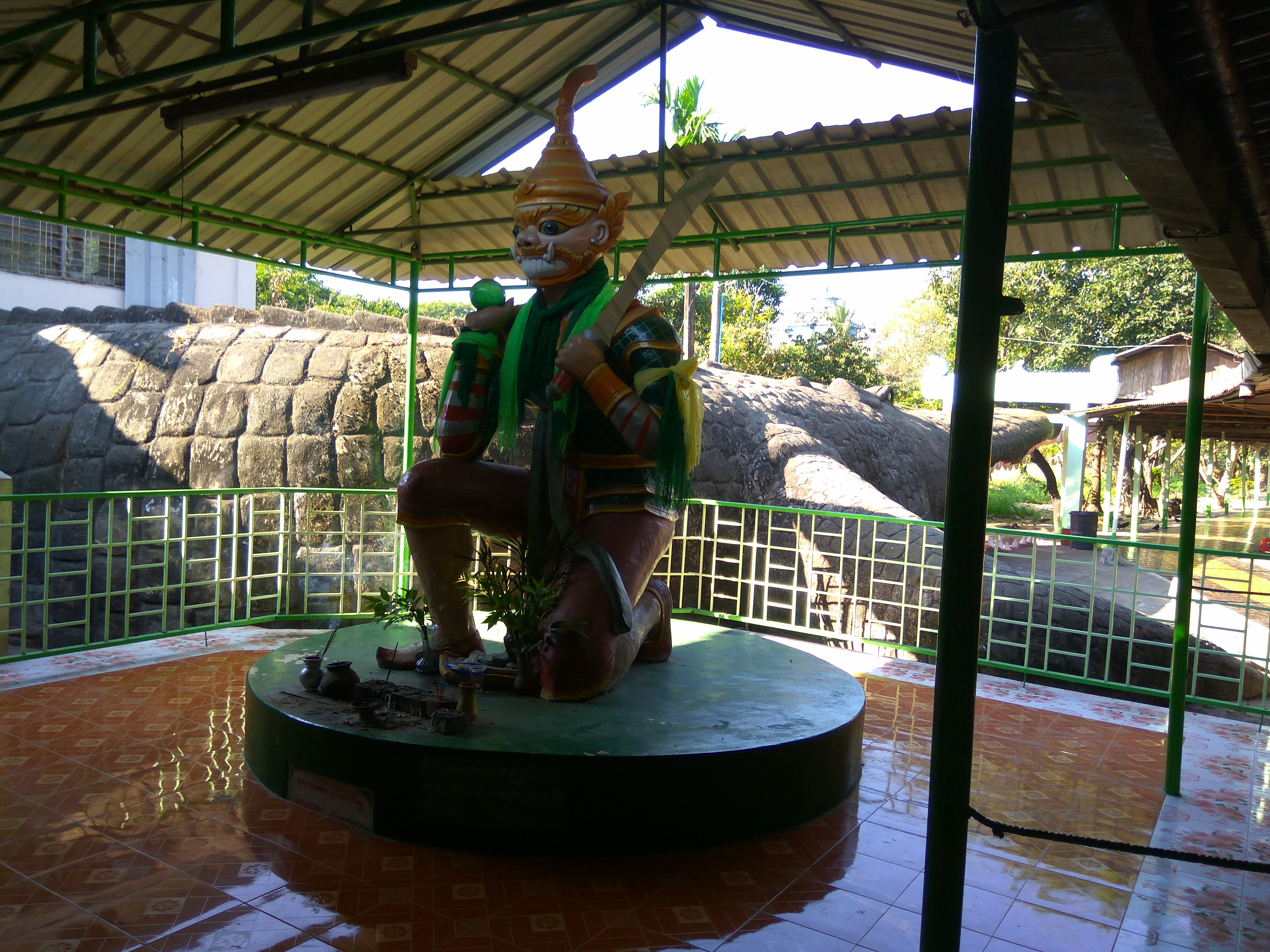 မြန်မာဘာသာ: မယ်လမုဘုရားရှိ ဘီလူးရုပ်တု။ ရန်ကုန်မြို့၊ မယ်လမုဘုရားတွင် တည်ရှိသည်။